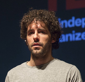 Víctor Lobo durante su charla en TEDx Zaragoza.